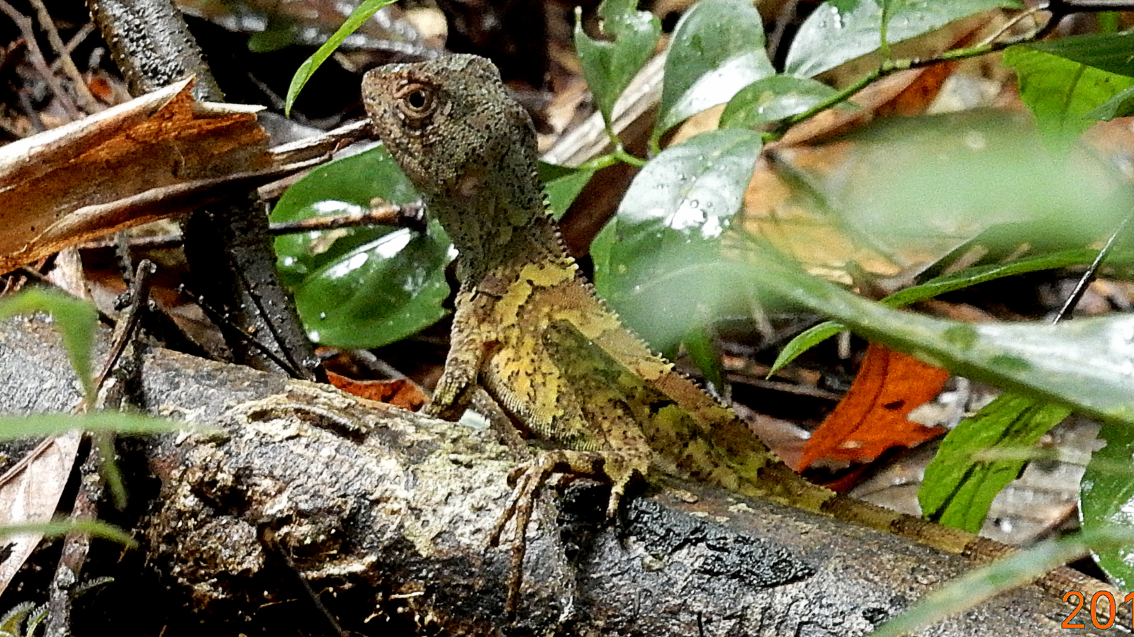 Enyalius catenatus (WIED-NEUWIED, 1821)